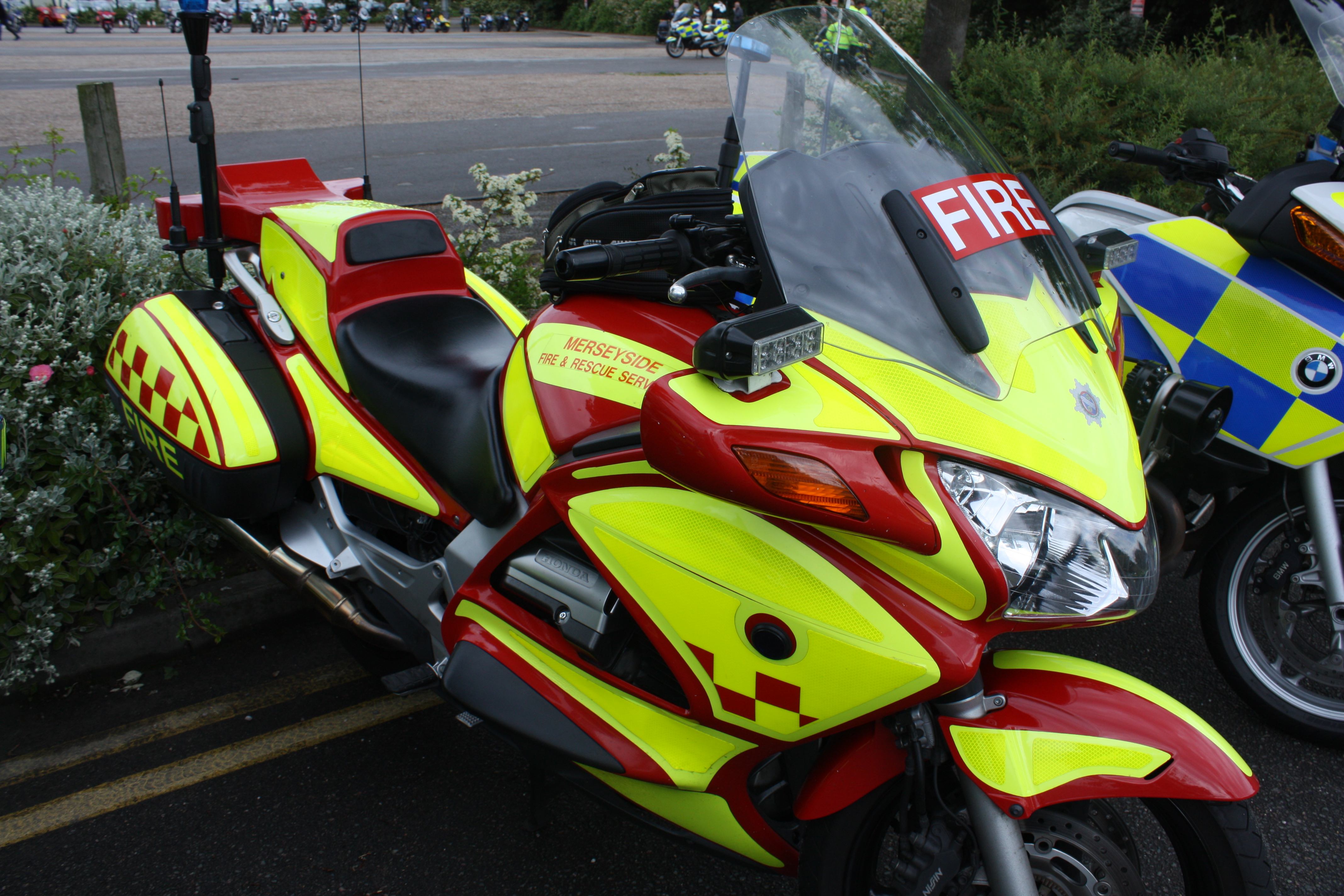 Mersey fire bike 2